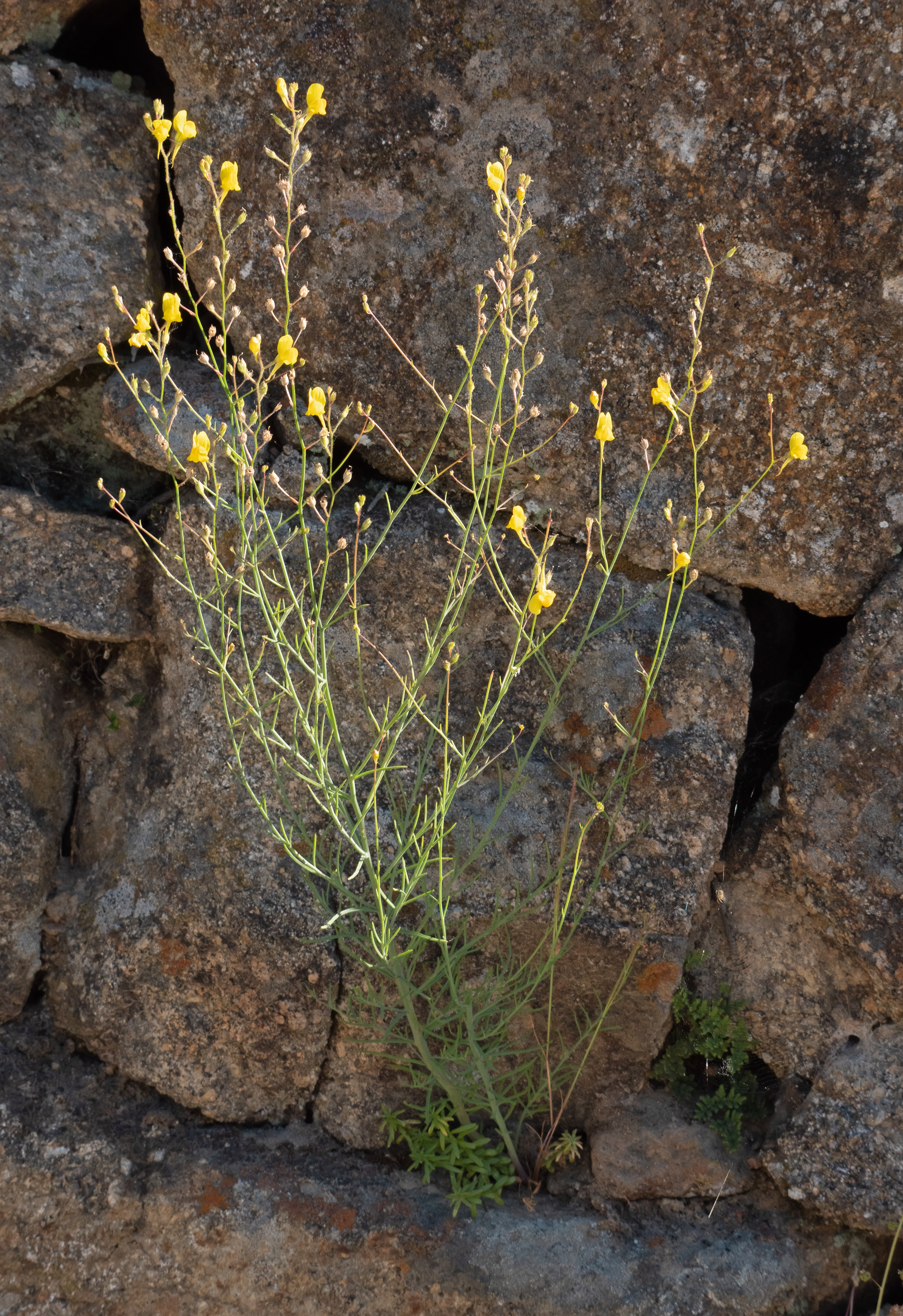 Linaria spartea. Losar de la Vera (Cáceres, España).